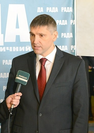 ВЕРХОВНА РАДА УКРАЇНИ 2013 , фото Вадим Чуприна